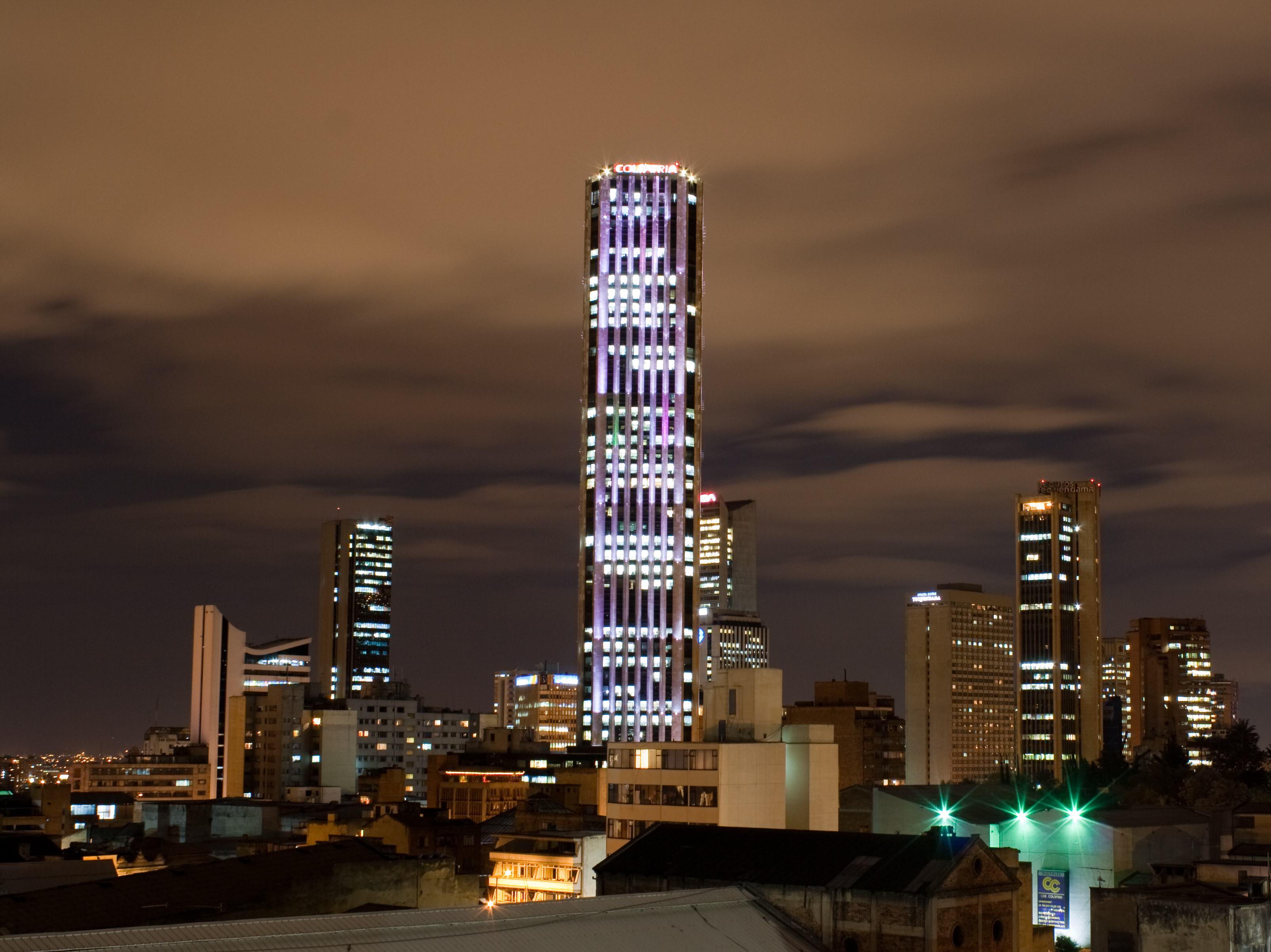 El Liston, Bogotá, Bogota, Colombia